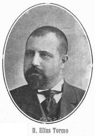 Elías Tormo y Monzón